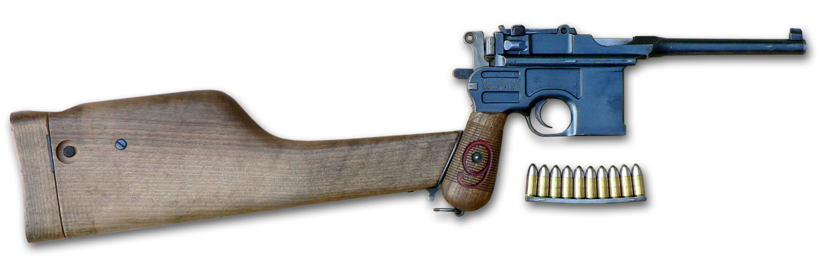 Neue Version des Bildes " mit neutralem weißen Hintergrund